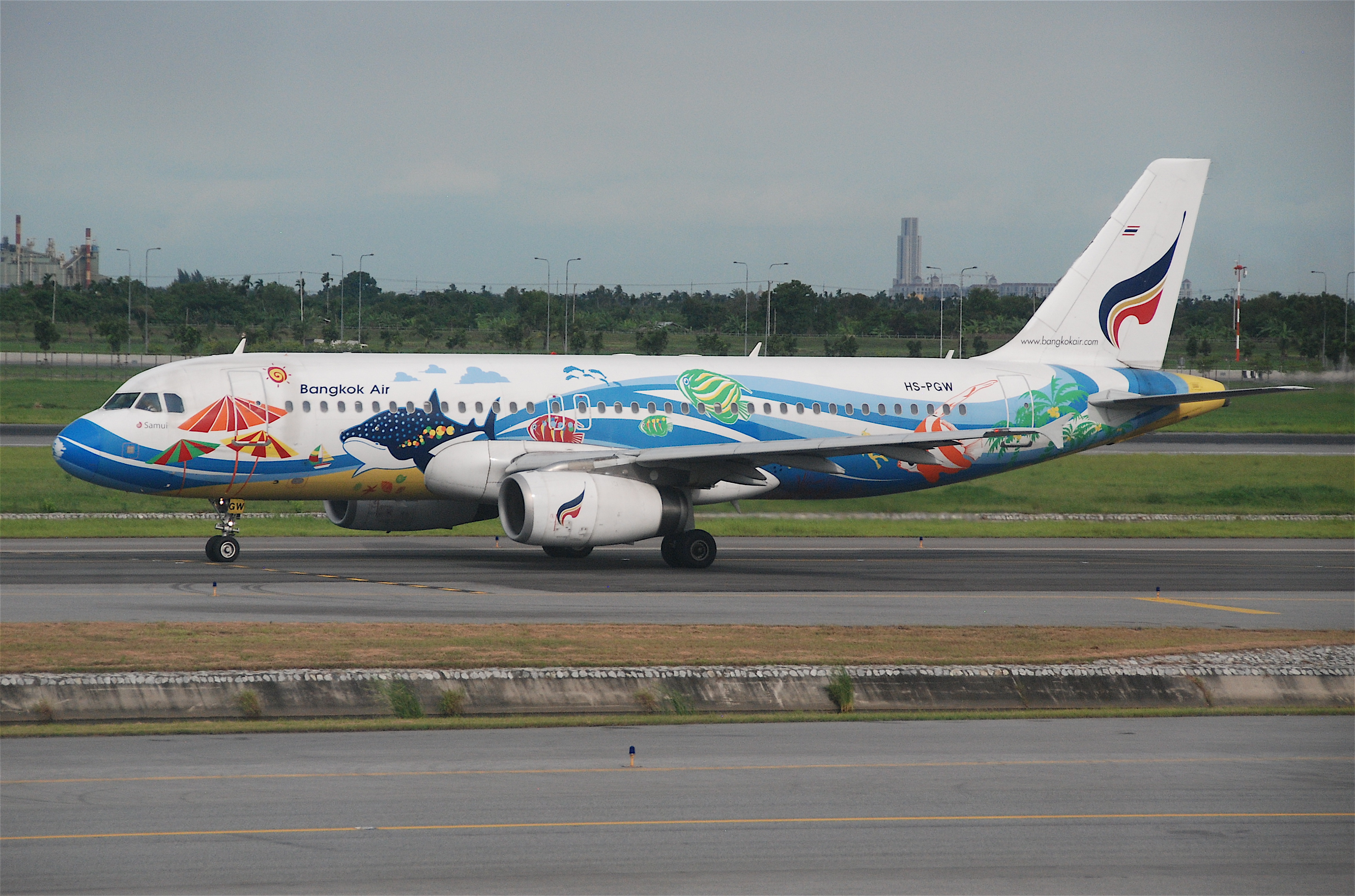 Bangkok Airways Airbus A320-232; HS-PGW@BKK;29.07.2011/612az